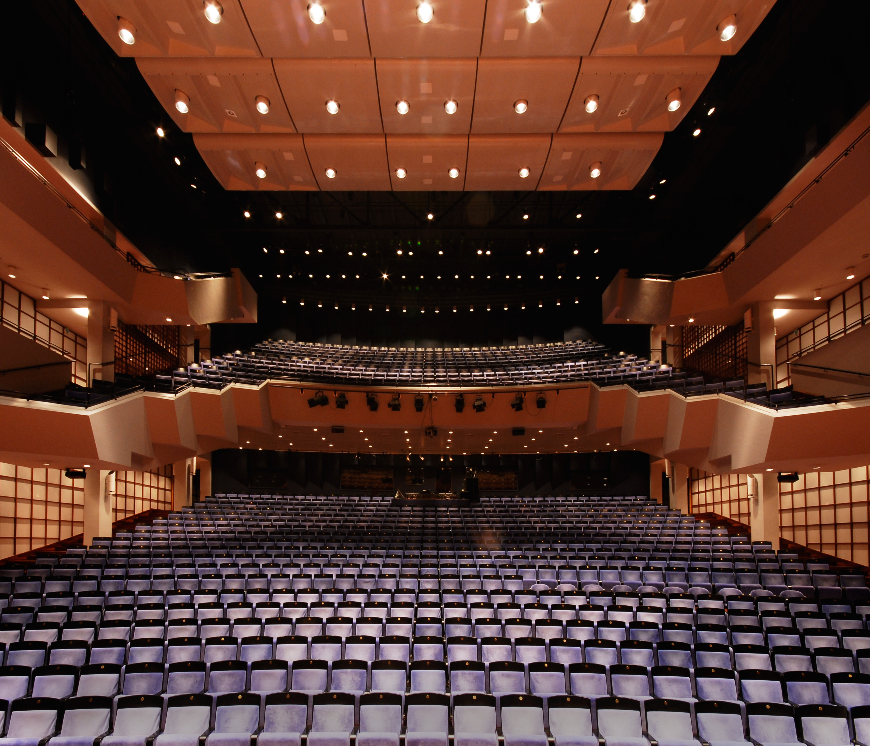 Oversiktsbilde over salen tatt fra scene.